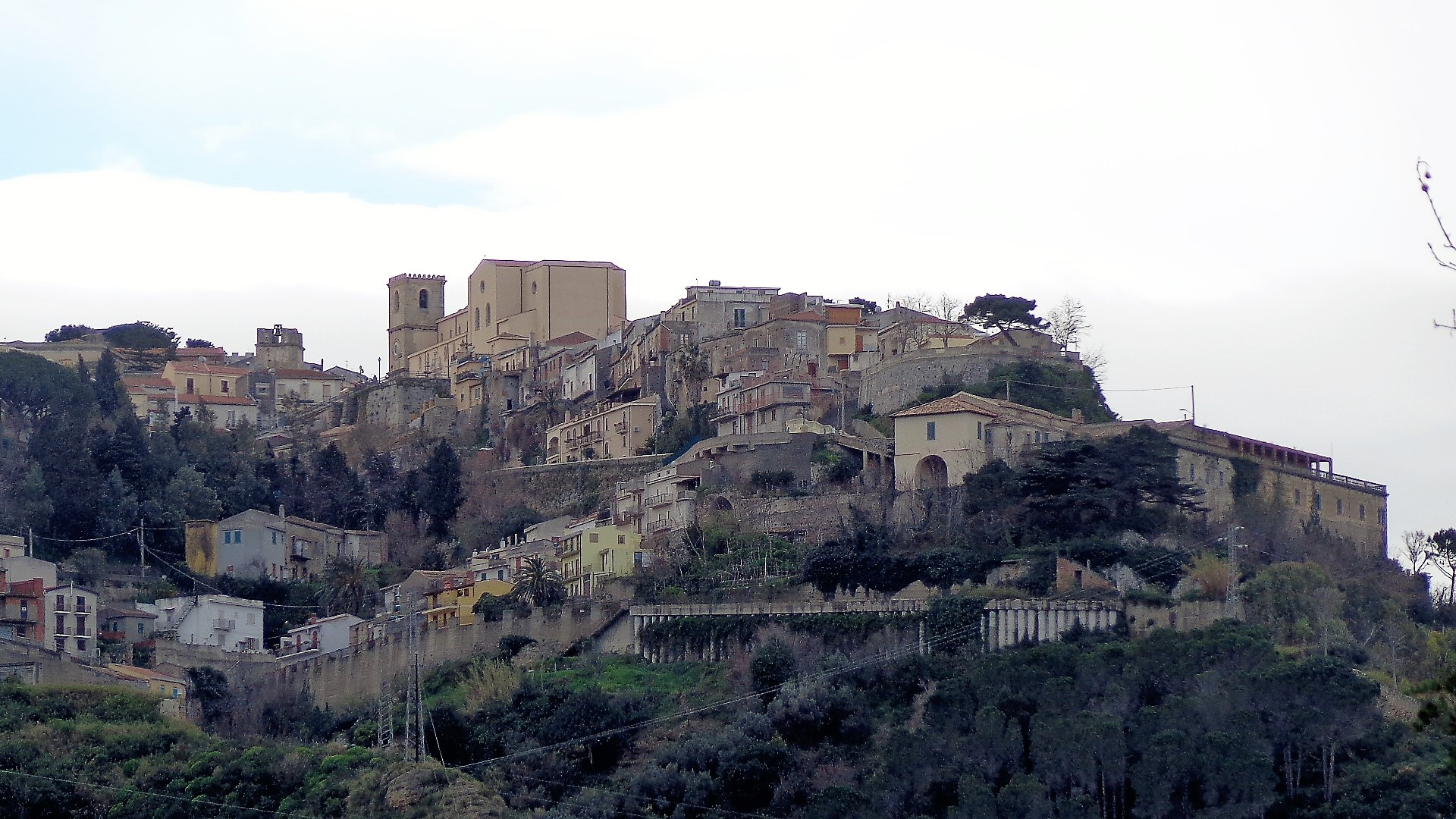 Il centro visto dalla strada provinciale